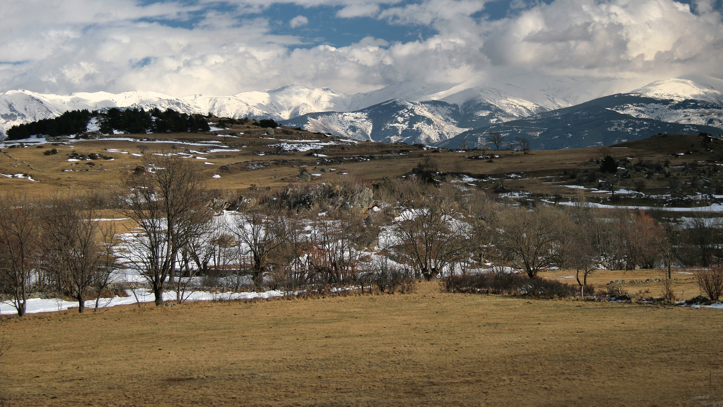 Bena